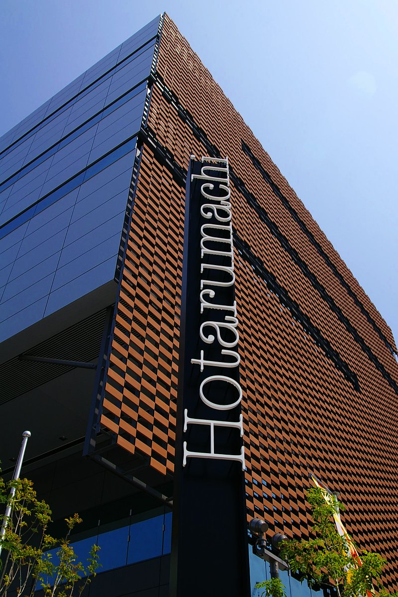 Hotarumachi, Fukushimaku, Osaka City, Japan.